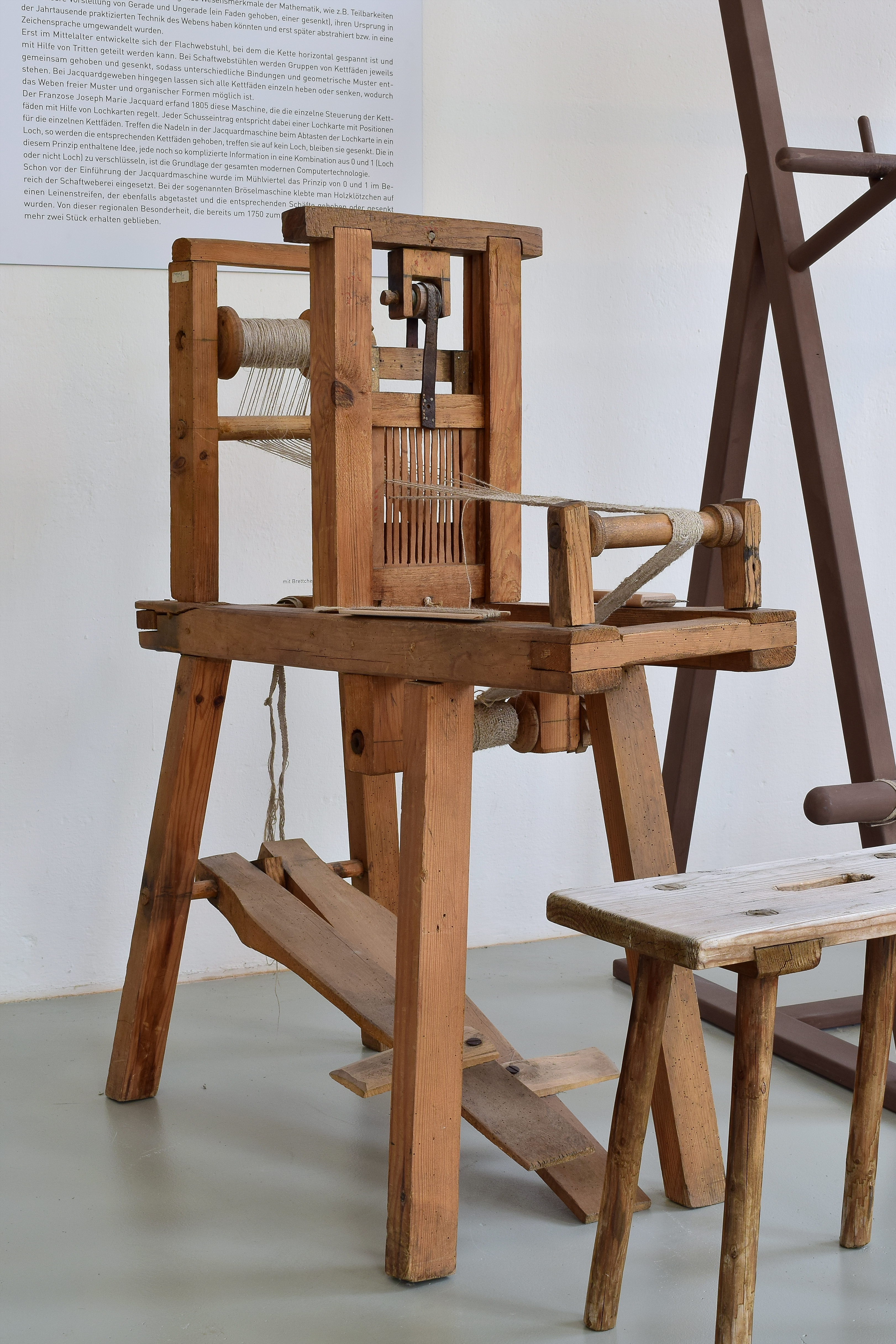 Die Aufnahme aus dem Textilen Zentrum in Haslach an der Mühl zeigt einen Bandwebstuhl mit Loch-Schlitz-Blatt. Beim Loch-Schlitz-Blatt bleiben die durch die Schlitze gespannten Kettfäden immer an der selben Position, während die durch die Löcher gezogenen Kettfäden beim Auf- und Abbewegen des Blattes gehoben oder gesenkt werden, wodurch ein Webfach entsteht.